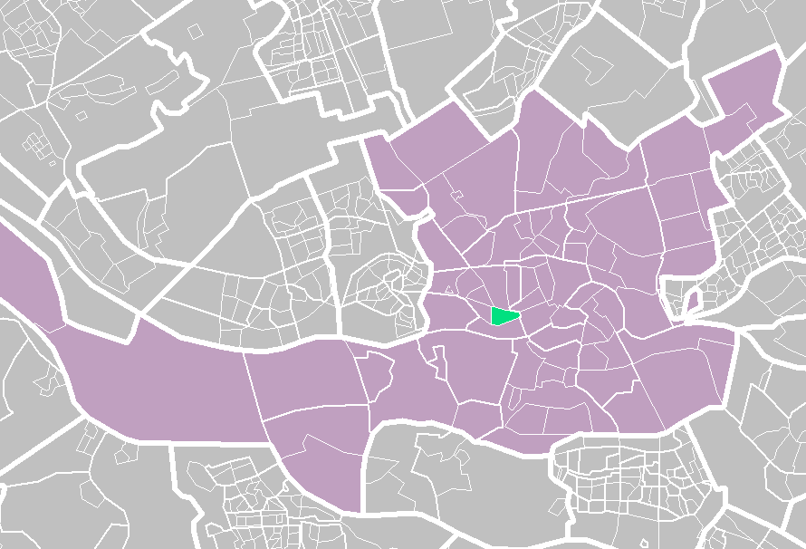 Rotterdam districts/neighboorhoods